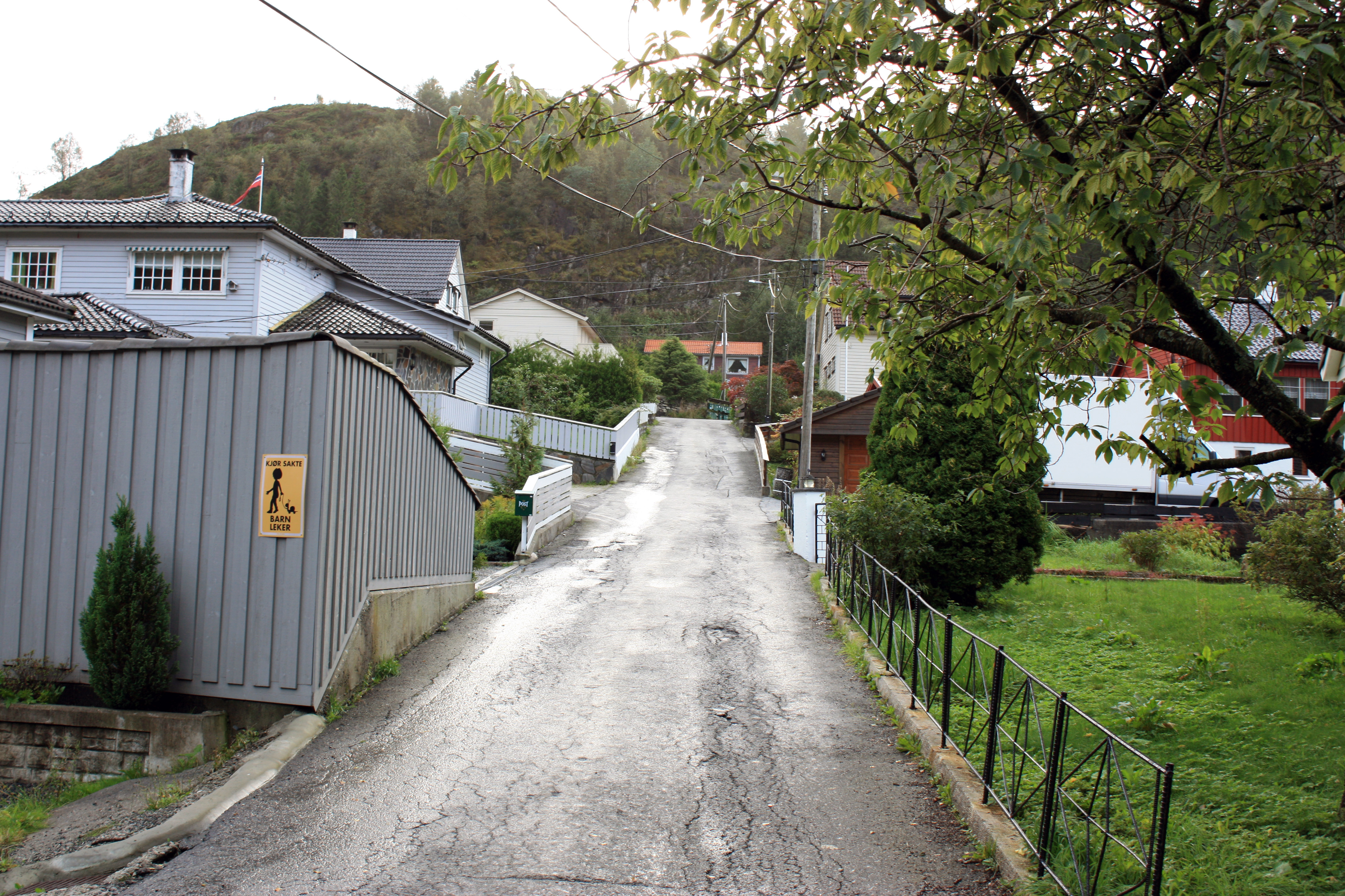 Vallahøgda, Fana, Bergen.